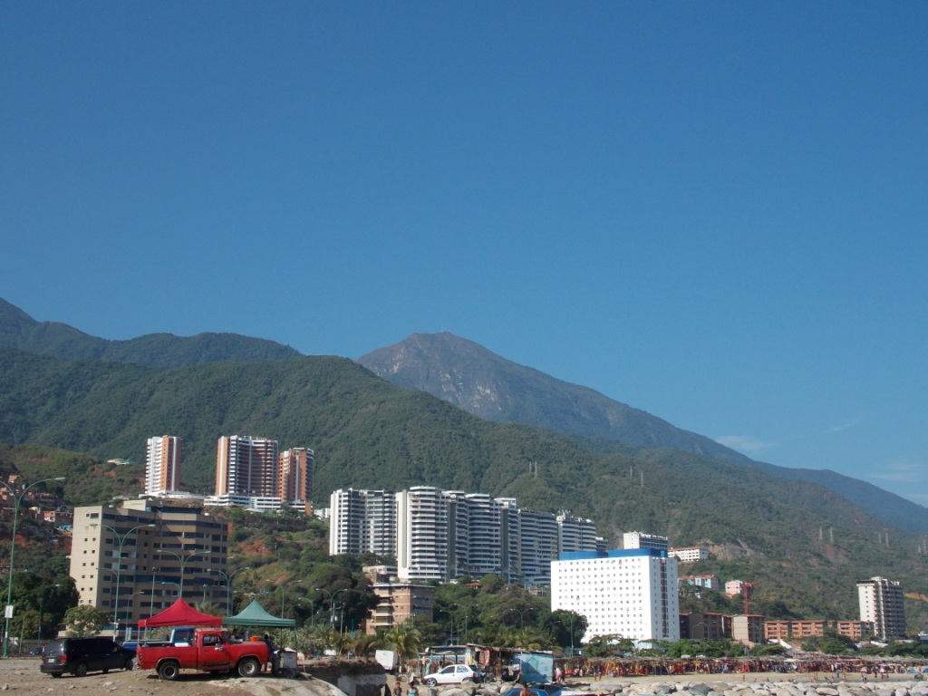 La Guairá, Estado Vargas